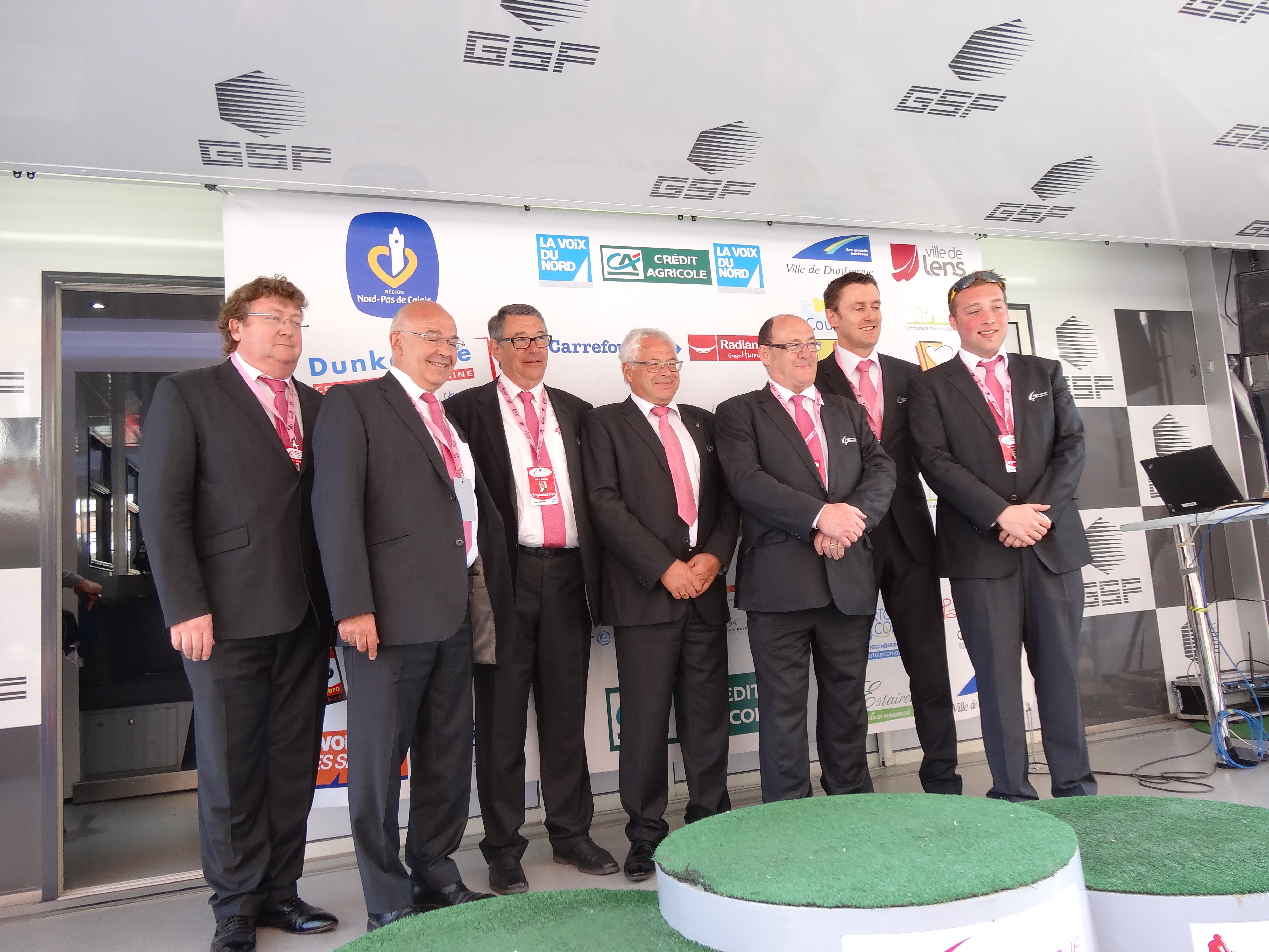 Reportage photographique réalisé le dimanche 5 mai 2013 à l'arrivée de la cinquième et dernière étape de l'édition 2013 des Quatre jours de Dunkerque à Dunkerque, Nord, Nord-Pas-de-Calais, France. Depicted people: Franck Miélot, Hervé Prouvoyeur, Jean Bodart, Bernard Martel and Joël Huysman